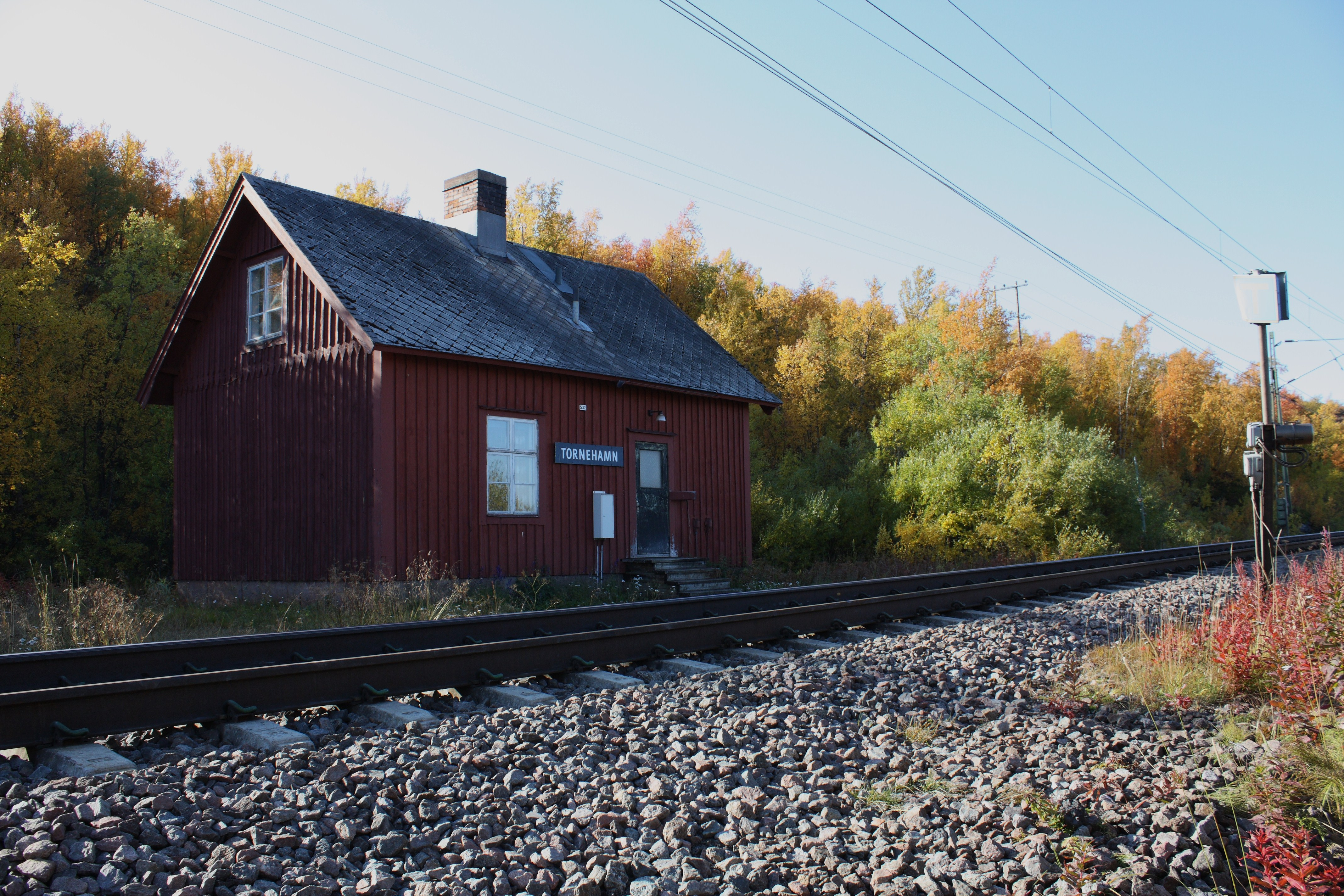 Banvaktsstuga vid f d hållplatsen Tornehamns kyrkogård, ovanför rallarkyrkogården vid Tornehamn.